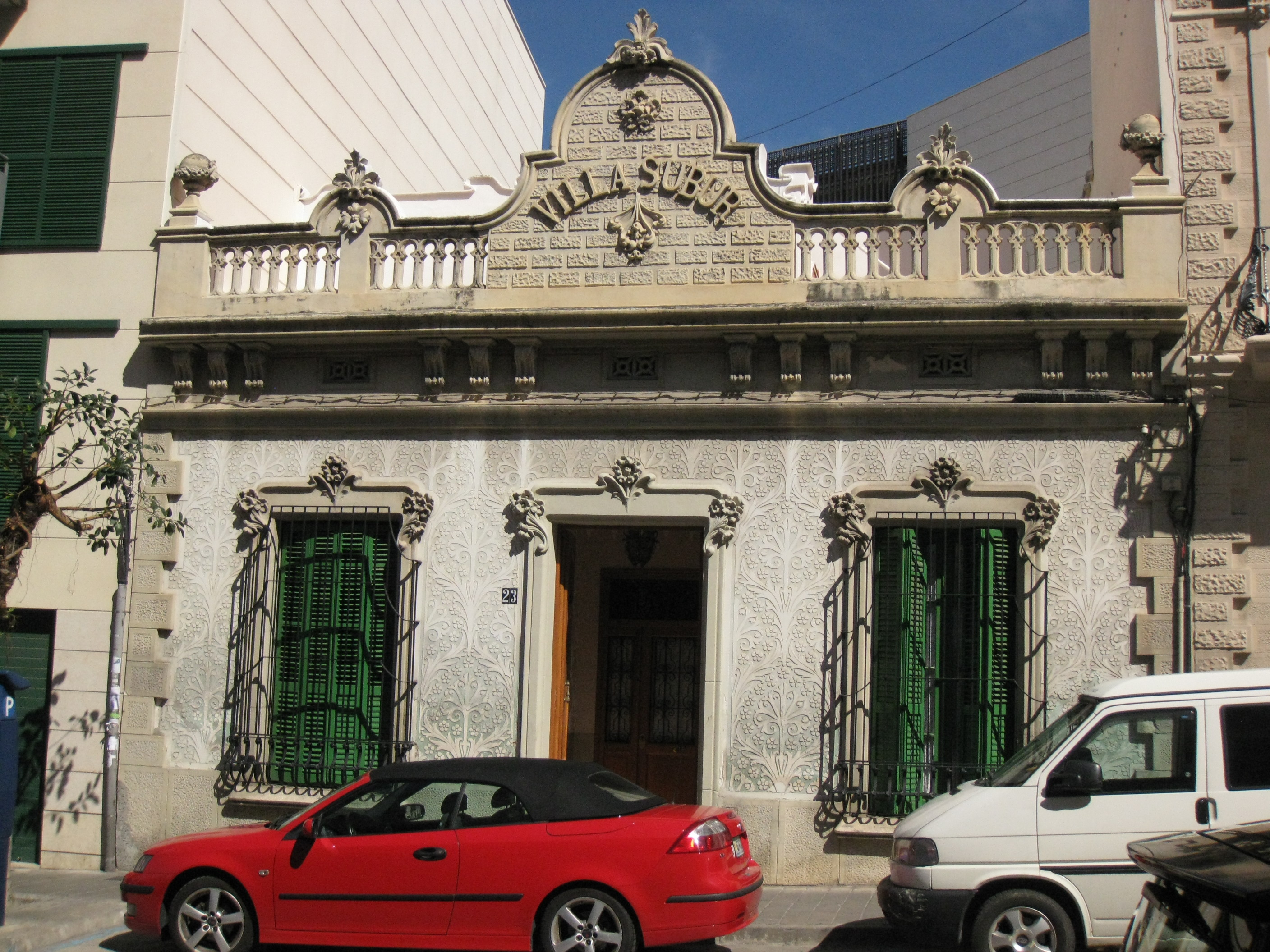 Villa Subur (Sitges)